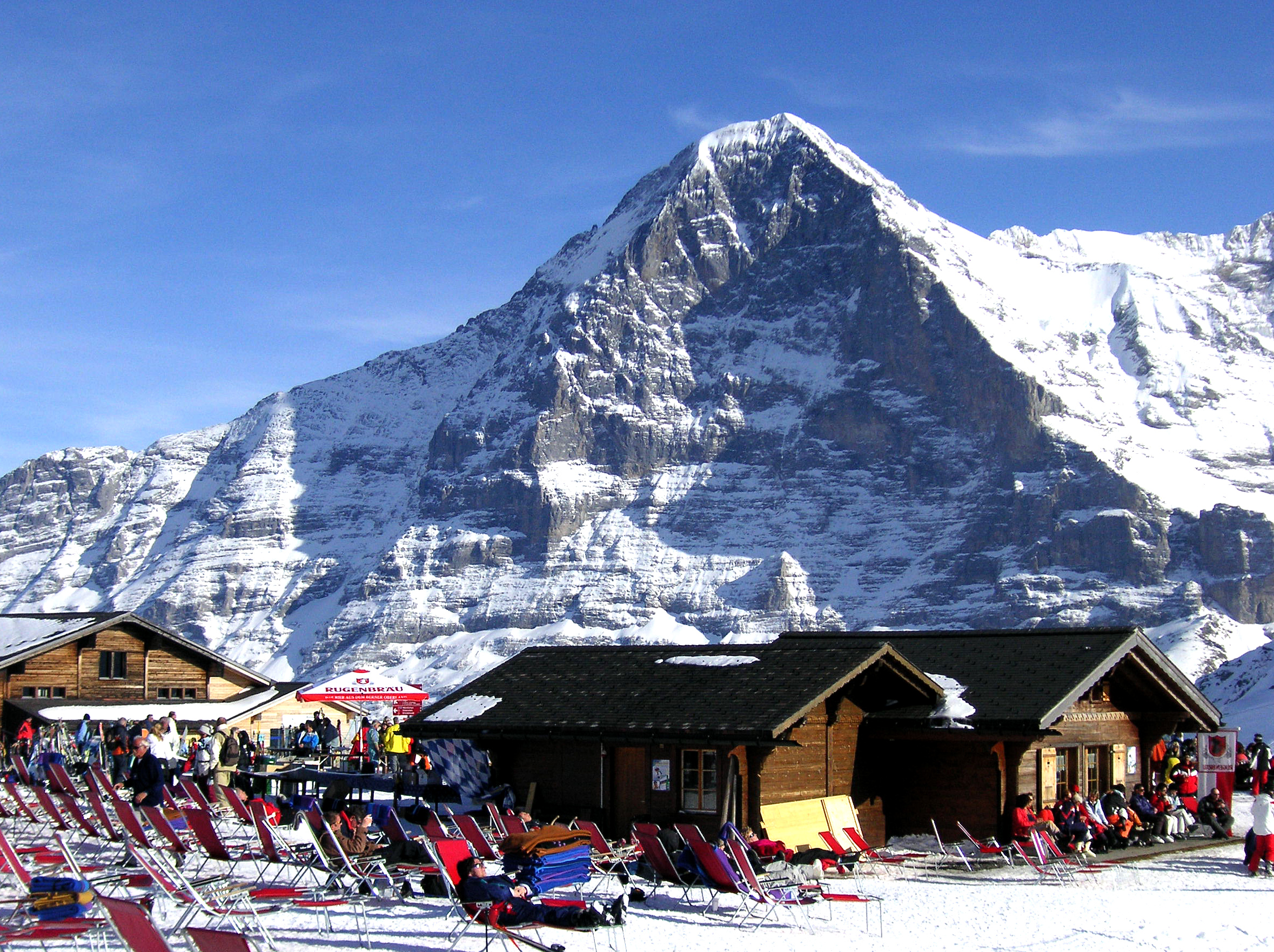 Eiger mitEigernordwand Männlichenbahn